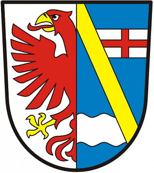 znak obce Huntířov (Okres Děčín)